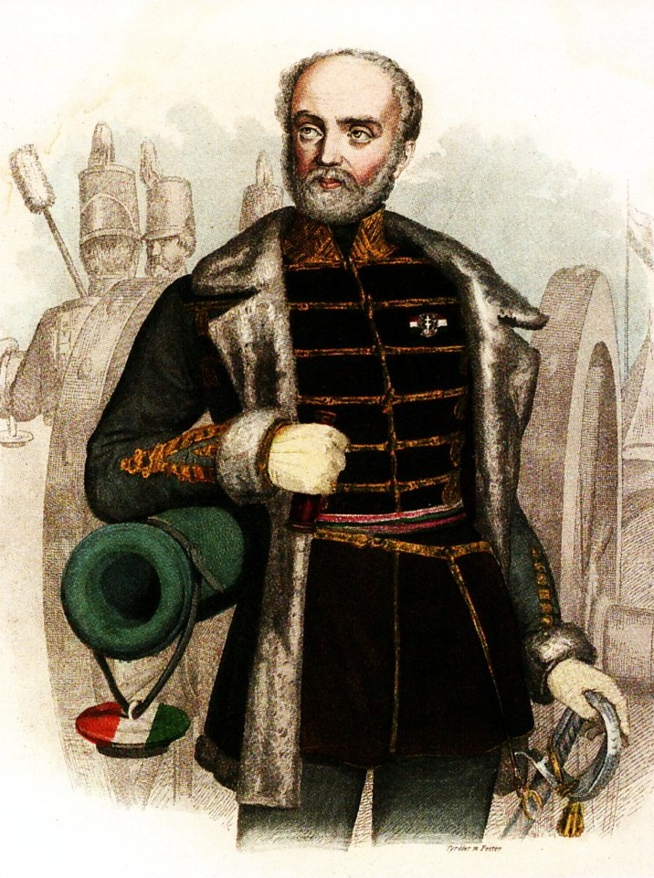 Józef Bem portréja. Tyroler József színezett litográfiája